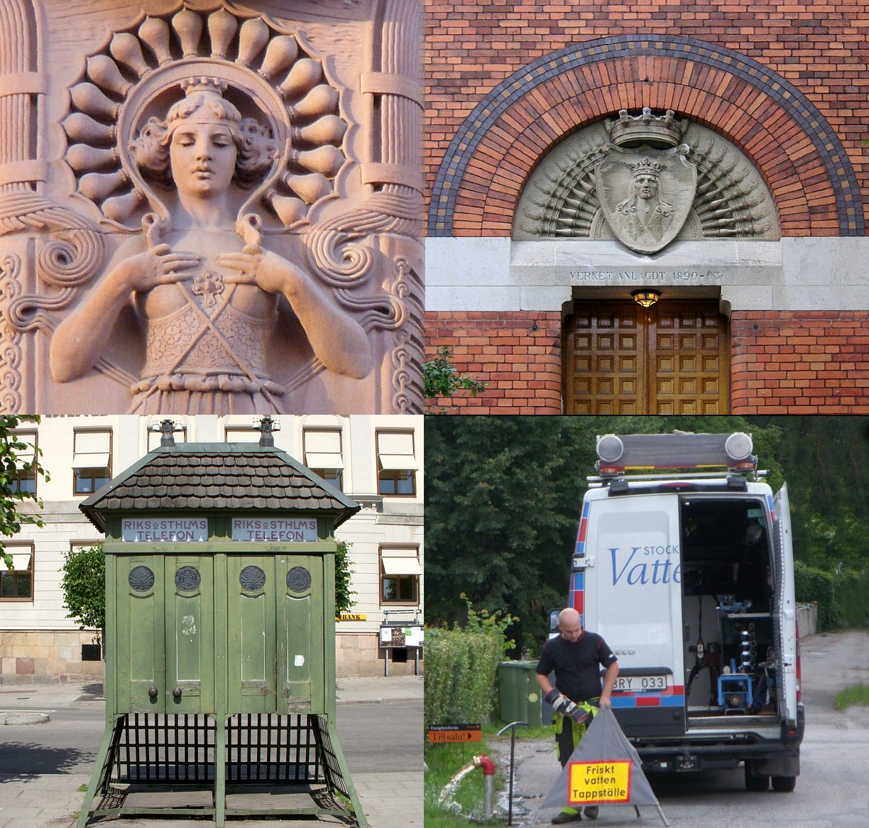 Kollage: Stockholms gas, Stockholms elektricitet, Stockholms telefoni och Stockholm Vatten